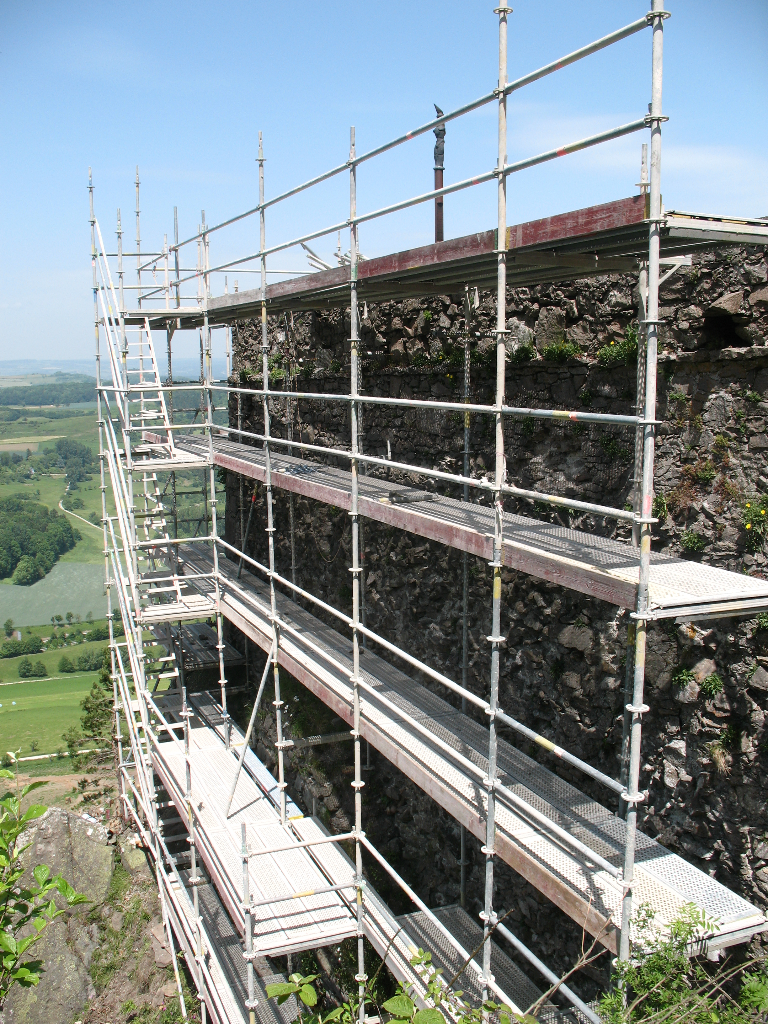 Baumaßnahmen an der Festung Hohentwiel: Gerüst an der Befestigung des Schmittefelsens